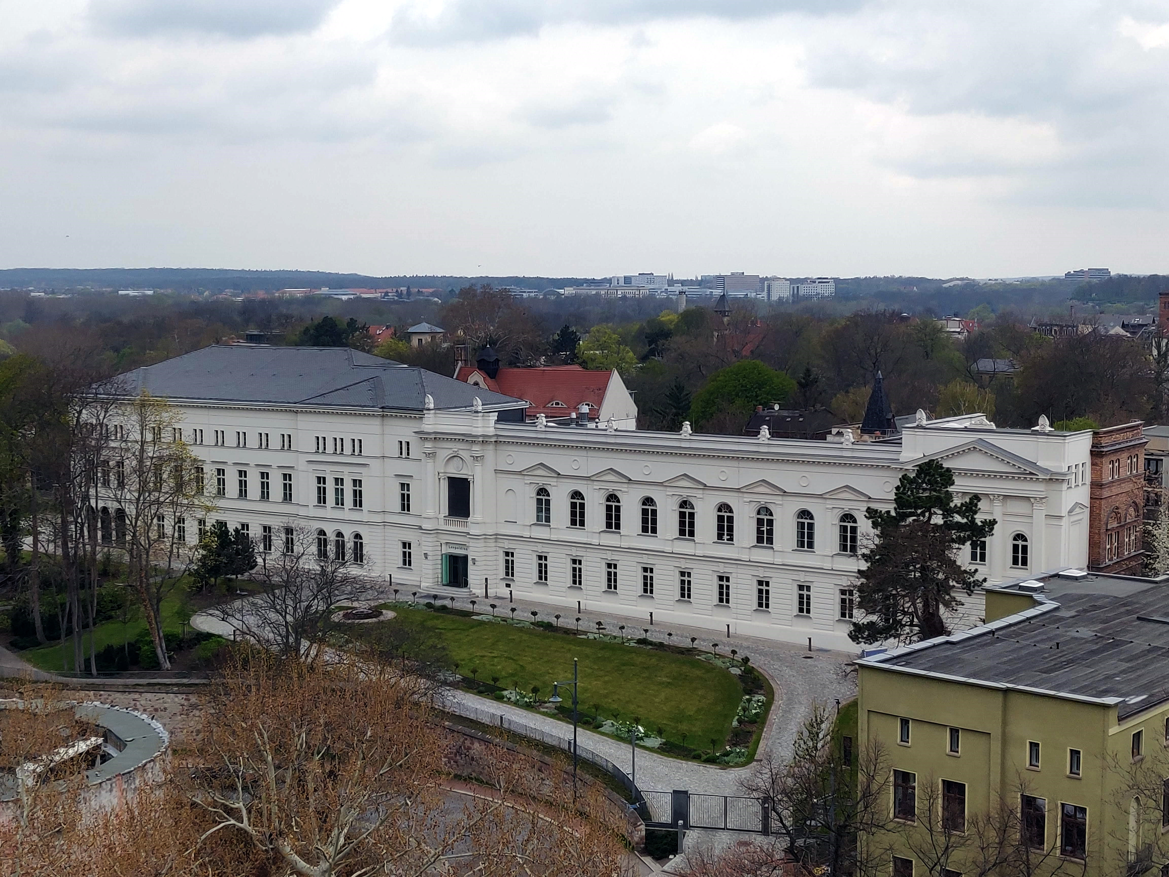 Blick auf die Leopoldina in Halle vom Turm der ehemaligen physikalischen Fakultät der Martin-Luther-Universität Halle-Wittenberg